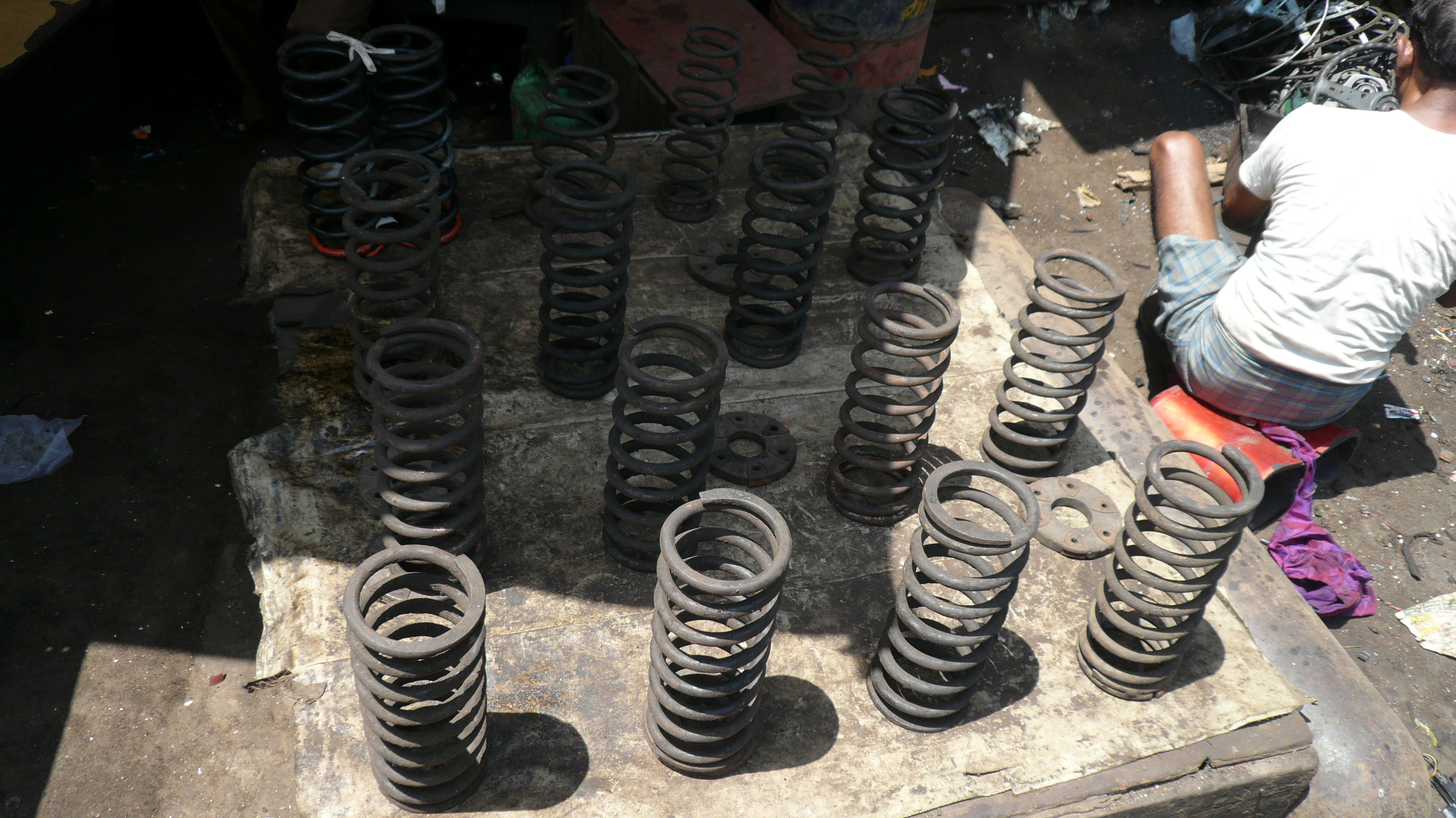 Spring at chor bazaar,mumbai